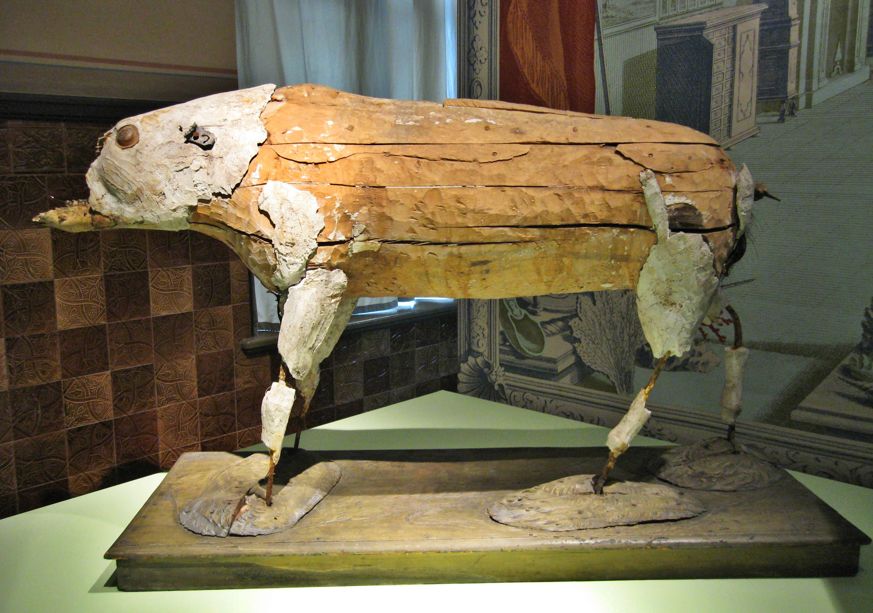 Der Eber - ursprünglich in der königlichen Kunstkammer ausgestellt und nun zu sehen im Naturkundemuseum Berlin - soll 1721 in Colbatz (Pommern) von Friedrich Wilhelm I. von Preußen im Alter von 9 Jahren erlegt worden sein. Fell, Unterbau und Augen gingen verloren; die Fragemente dokumentieren jedoch die Präparationstechnik von vor 300 Jahren.